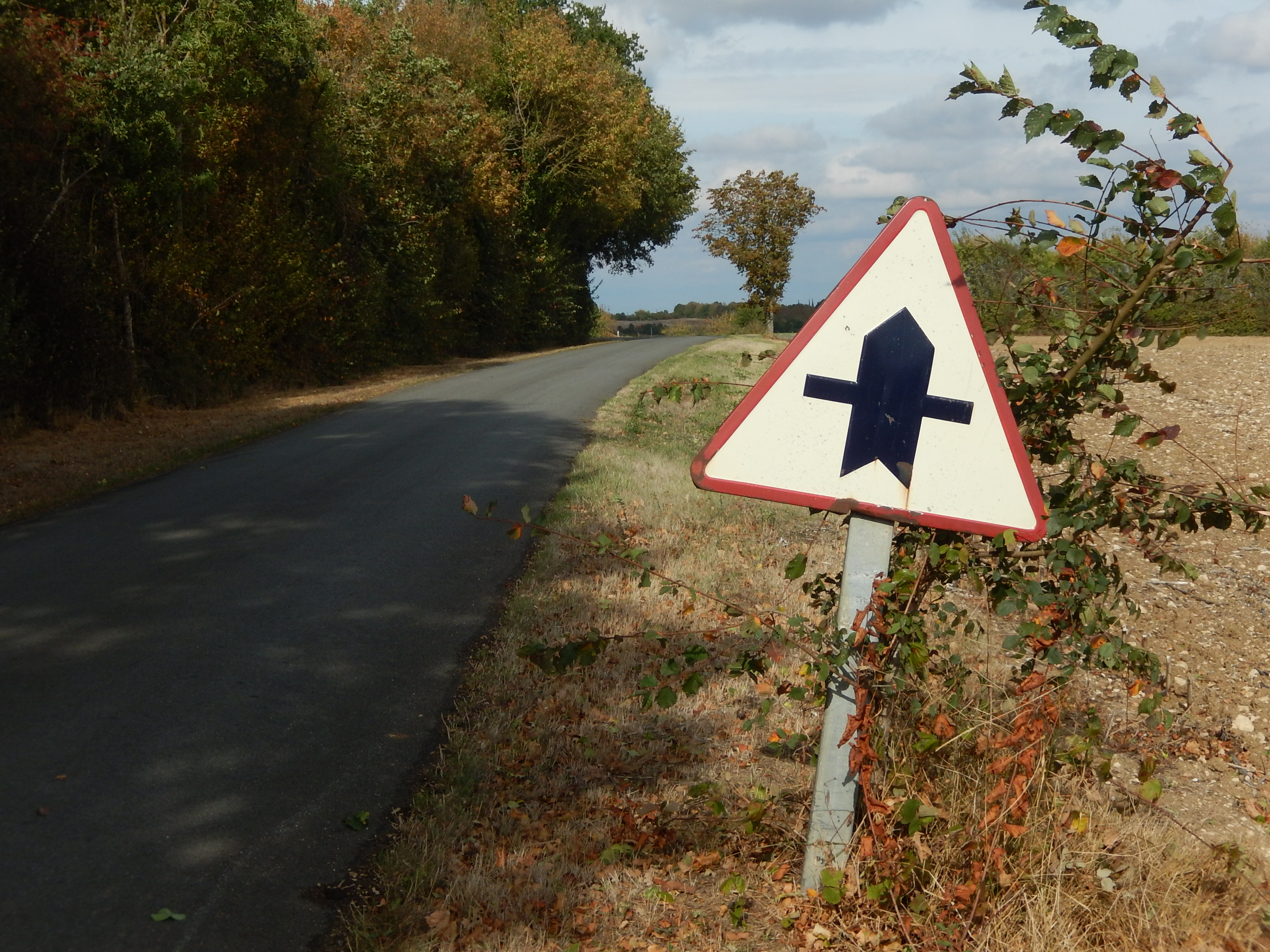 Un panneau de signalisation routière de priorité français, de type AB2, photographié au nord de Tonnay-Boutonne. Un marquage situé au dos du panneau indique qu'il a été produit en 1960 par la société Vitracier-Neuhaus.